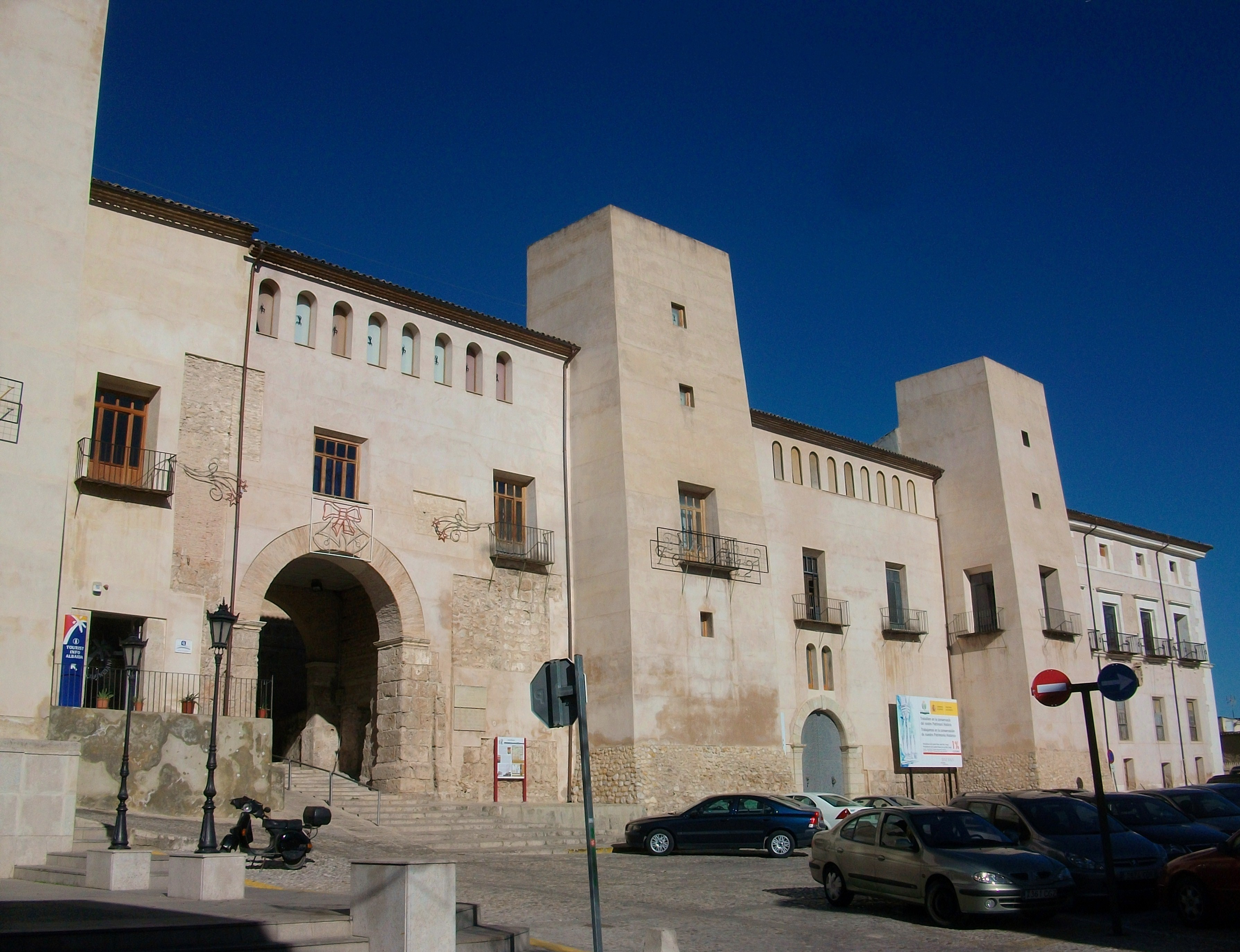 Albaida, palau dels Milà i Aragó.